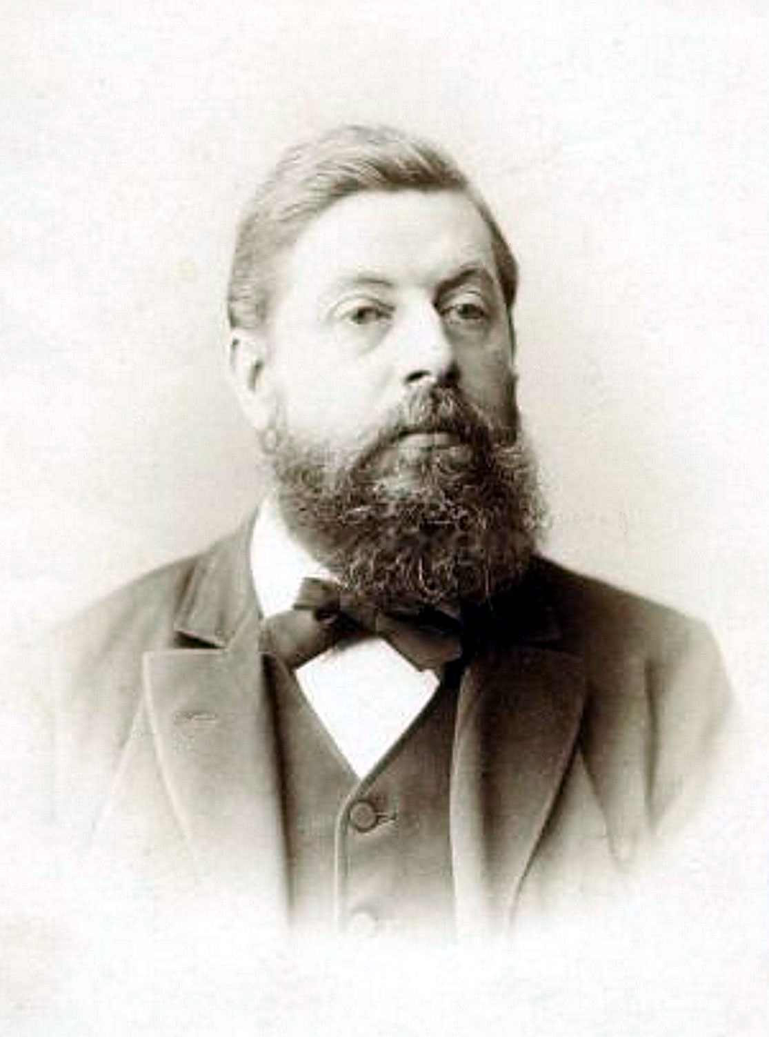 Jacob Verdam (1845-1919) niederländischer Niederlandtist